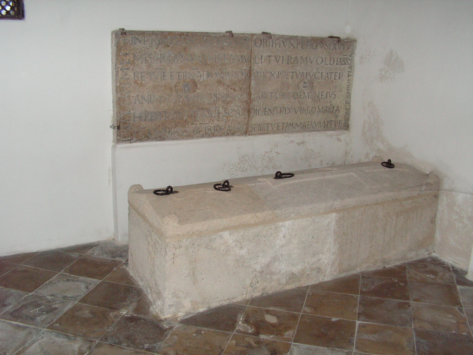 Grab Ramwolds in St. Emmeram zu Regensburg